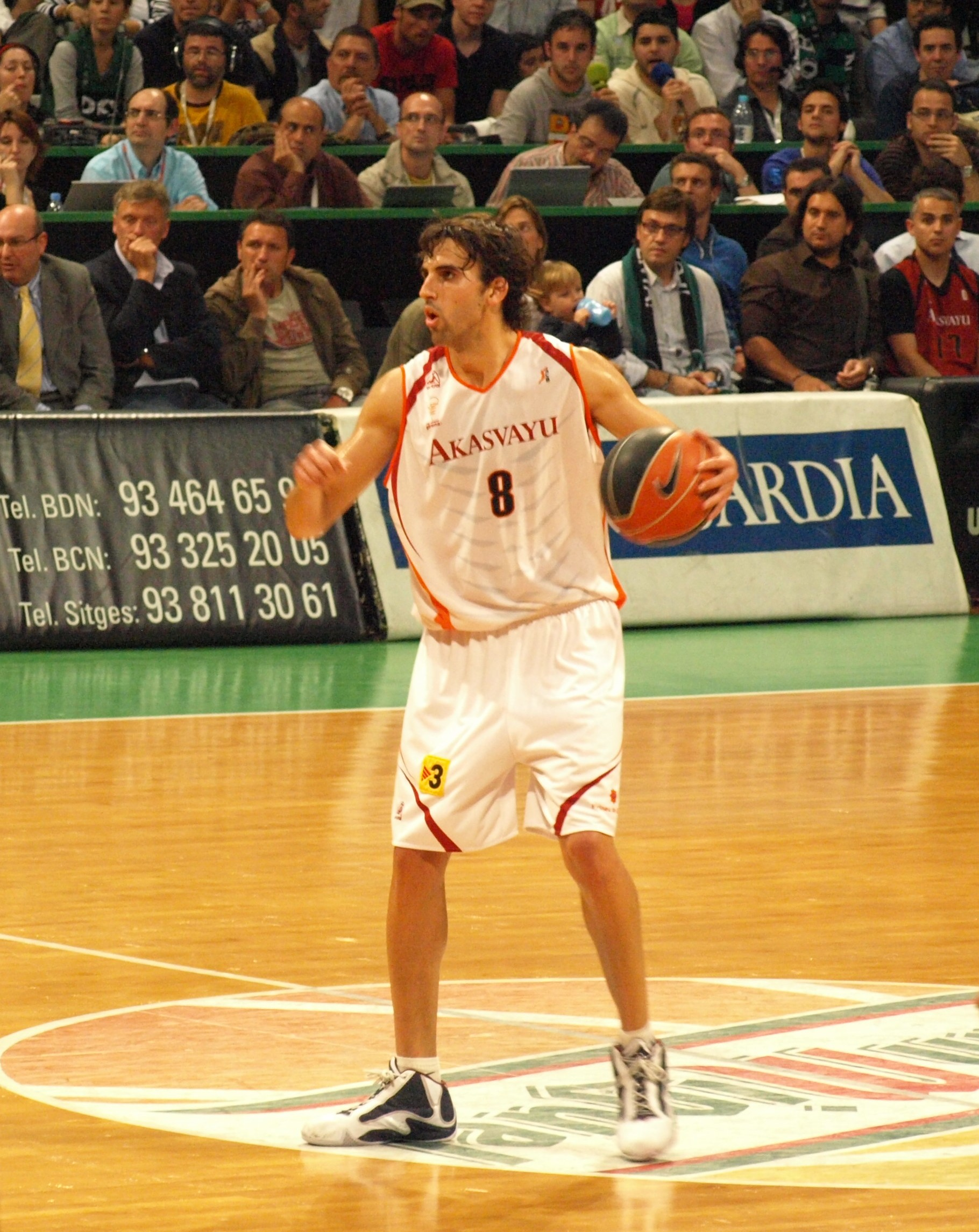 Victor Sada, jugador del Akasvayu en el 3er partido de los cuartos de final de los play-off de la liga ACB en el pabellón Olímpico de Badalona.